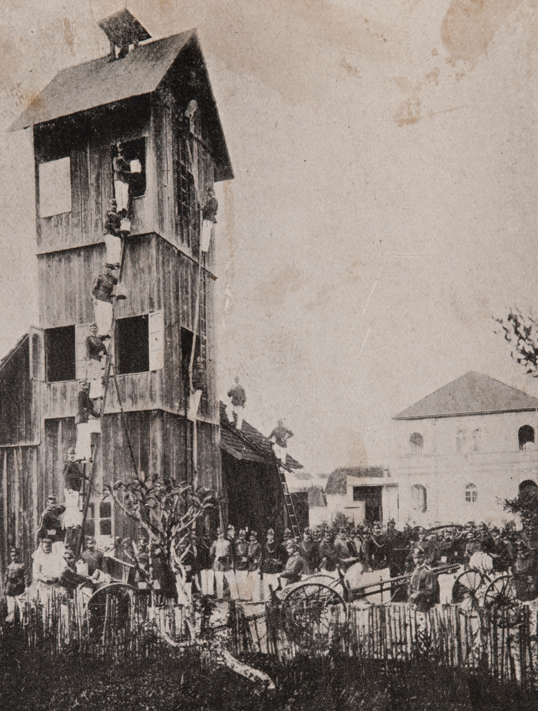 Obra que integra o acervo do Museu Paulista da USP. Coleção João Baptista de Campos Aguirra.